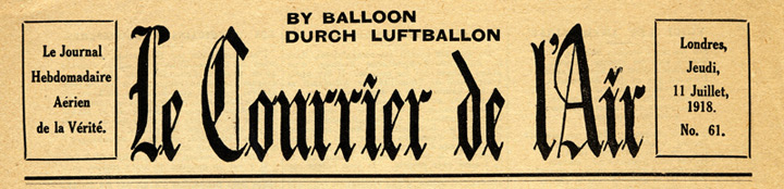 Titel der Propaganda Zeitschrift "le courrier de l'air" ,1918